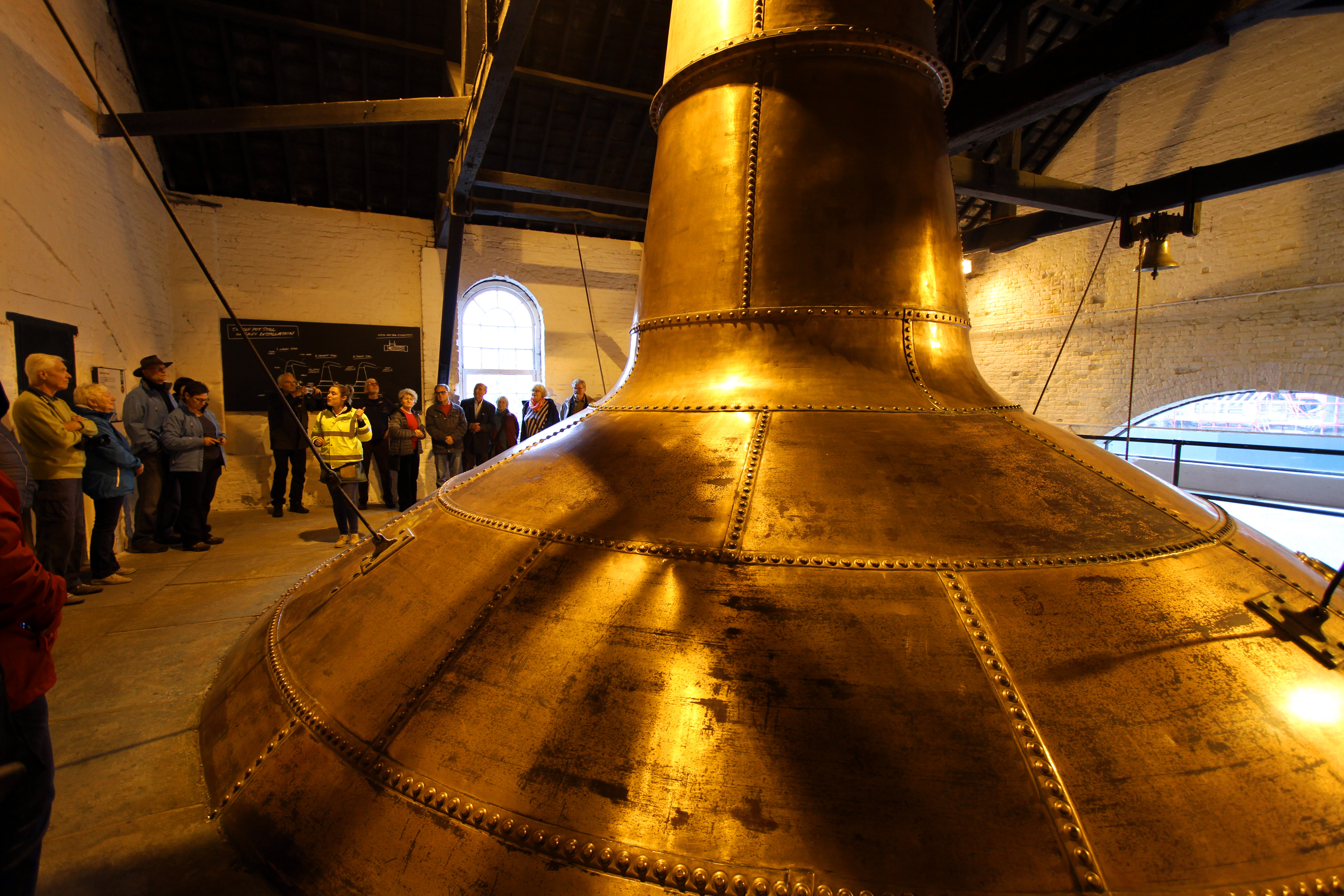 Jameson Whiskey Distillery in Midleton